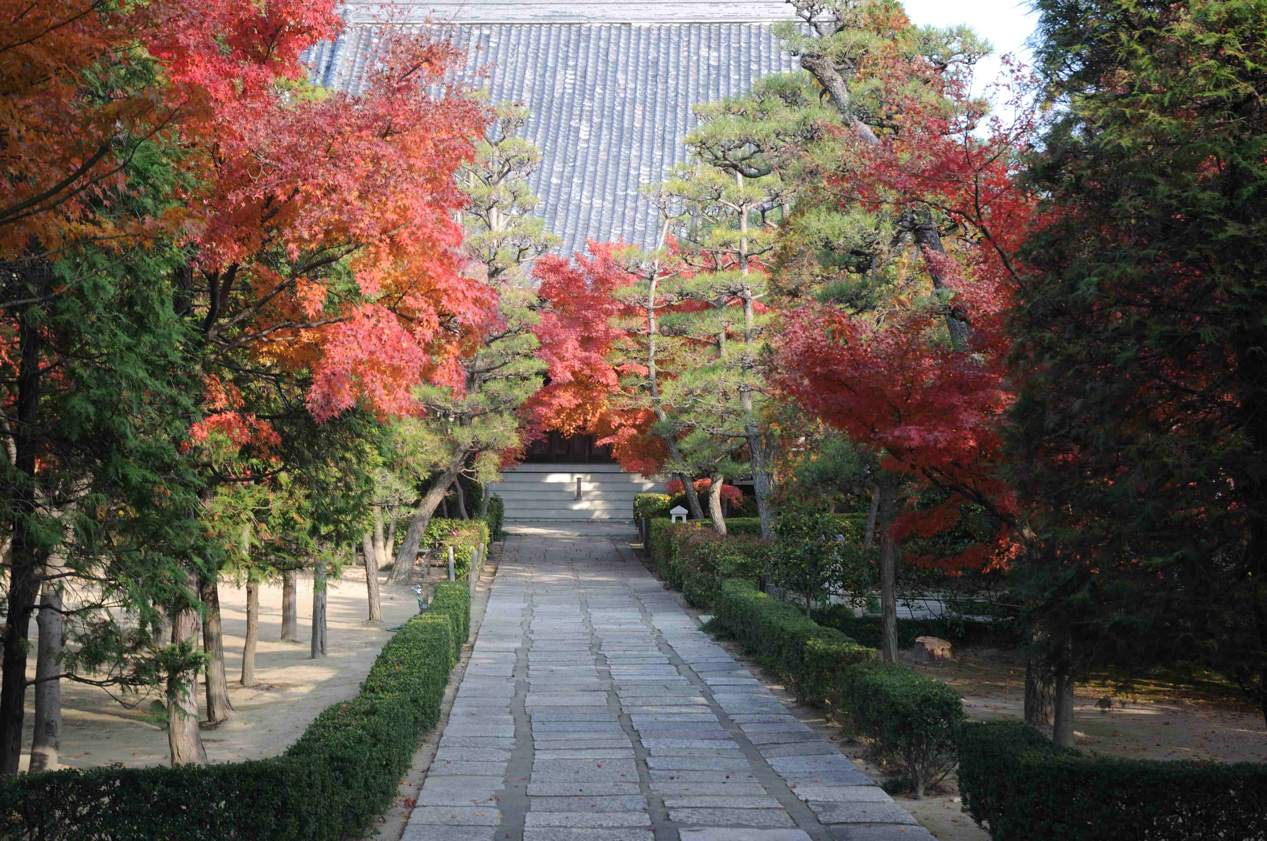 temple's view